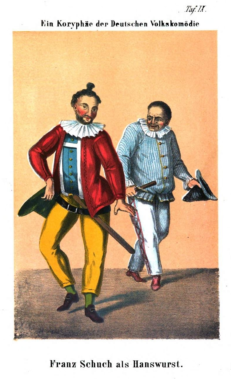 Tafel aus Karl Friedrich Flögel, Friedrich Wilhelm Ebeling (Bearb.): "Geschichte des Grotesk-Komischen", 1862; Flögel1862 09 Franz Schuch als Hanswurst.jpg